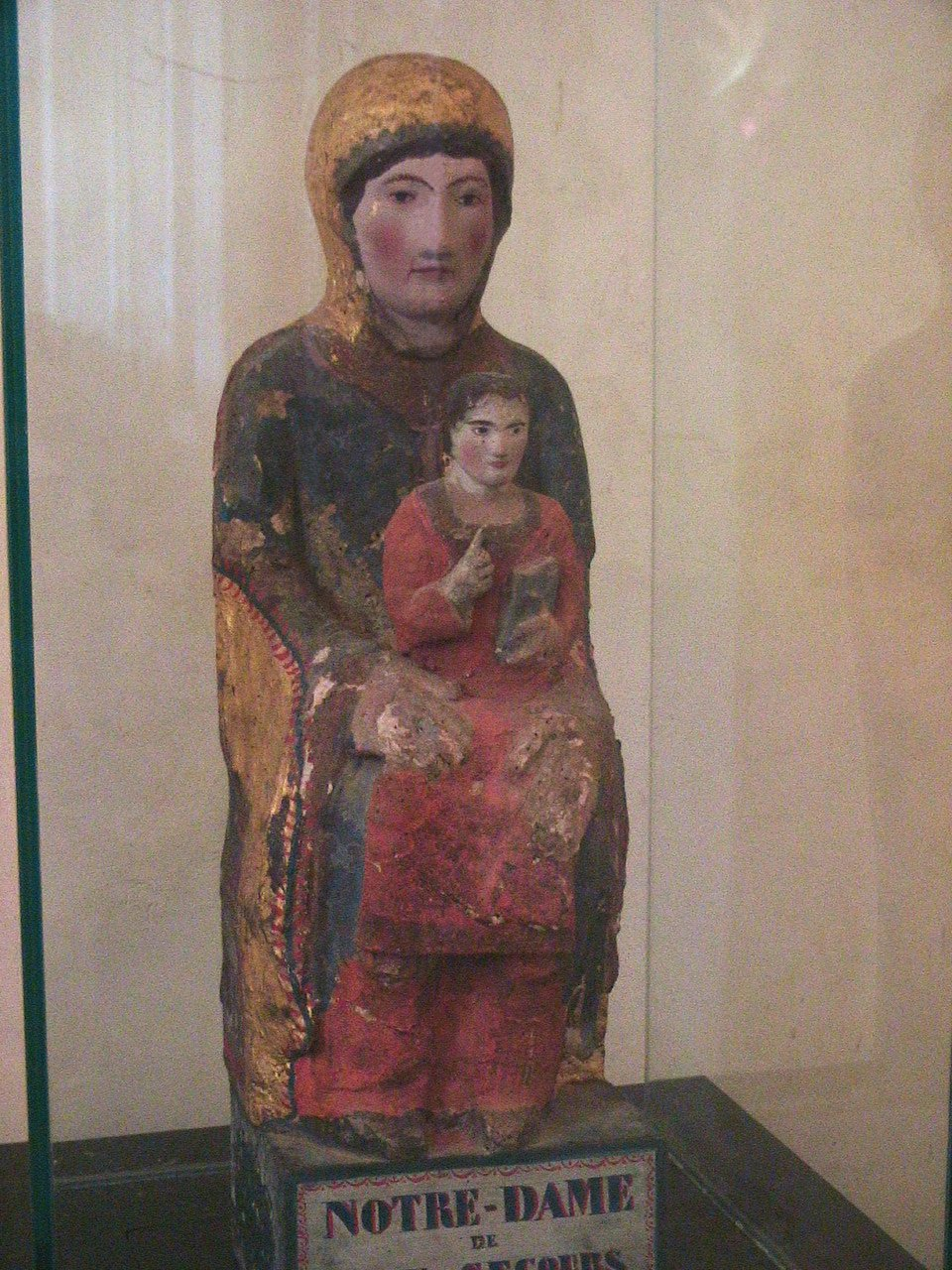 Statue XIIème siècle de Notre-Dame de Bon Secours présentée en l'église Saint-Michel de La Garde-Adhémar (FR-26)